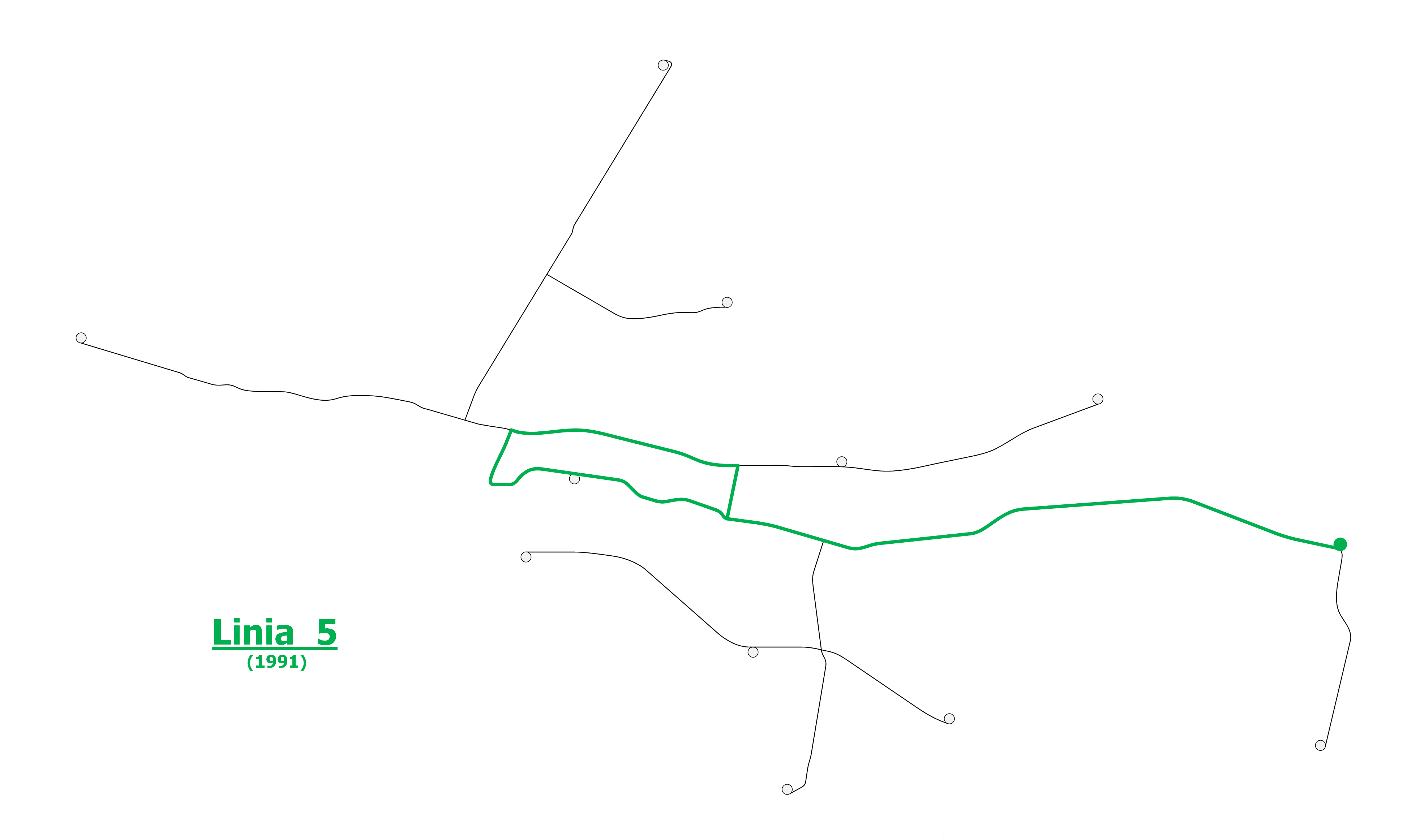 Schemat linii tramwajowej 5 w Bydgoszczy (w roku 1991).